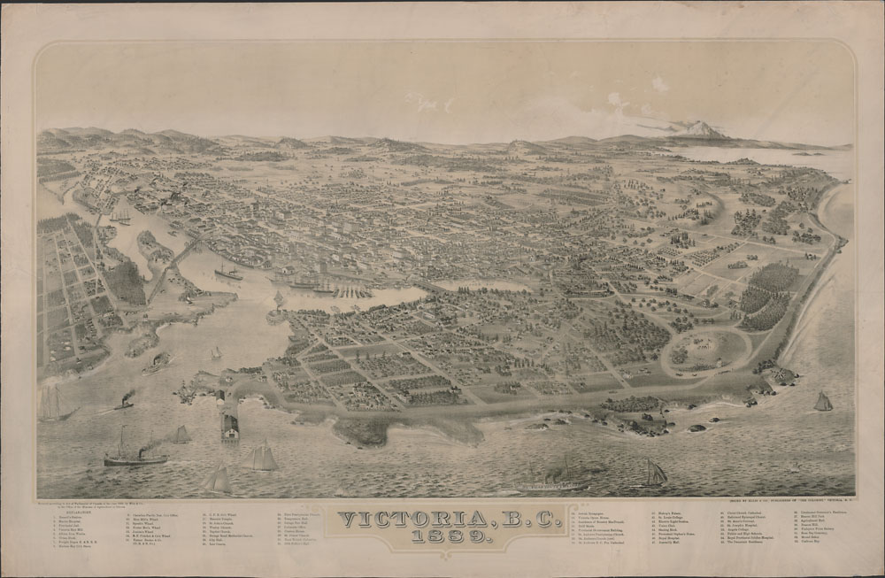 Title / Titre : Bird’s-eye view of Victoria, British Columbia, 1889 / Vue à vol d’oiseau de Victoria (Colombie-Britannique), 1889 Creator(s) / Créateur(s) : H.R. Ellis Date(s) : 1889 Reference No. / Numéro de référence : MIKAN 3793538 Location / Lieu : Victoria, British Columbia, Canada / Victoria, Colombie-Britannique, Canada Credit / Mention de source : H.R. Ellis & Co. Library and Archives Canada, e010771264 / H.R. Ellis & Co. Bibliothèque et Archives Canada, e010771264